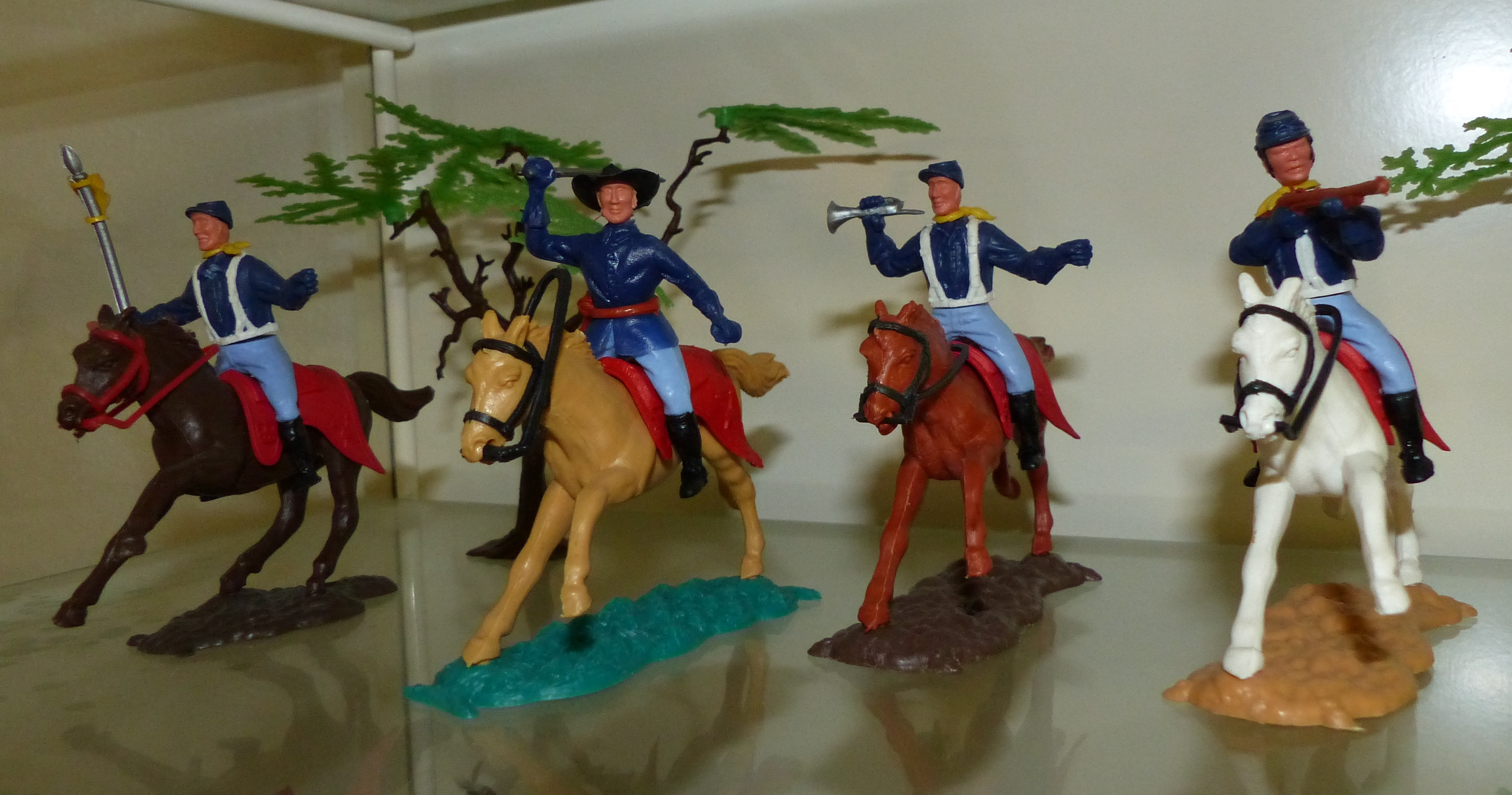 Kunststofffigur der Firma Timpo Toys